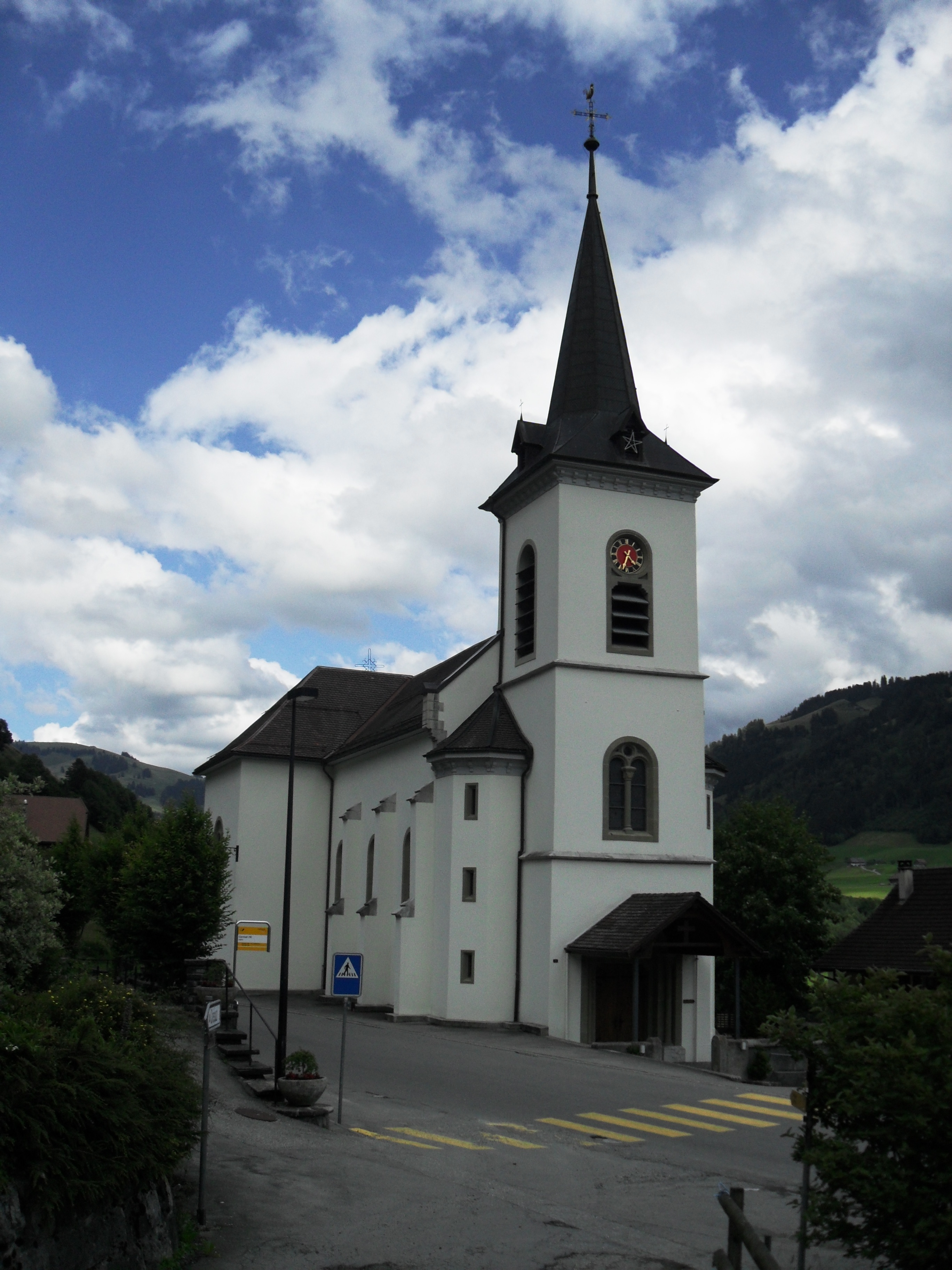 Eglise dédiée à SS Jean et Paul à Cerniat, construit en en 1840 dans le style de l’ancienne église qui a brulé dans la nuit du 24 au 25 décembre 1838 qui datait de 1615.